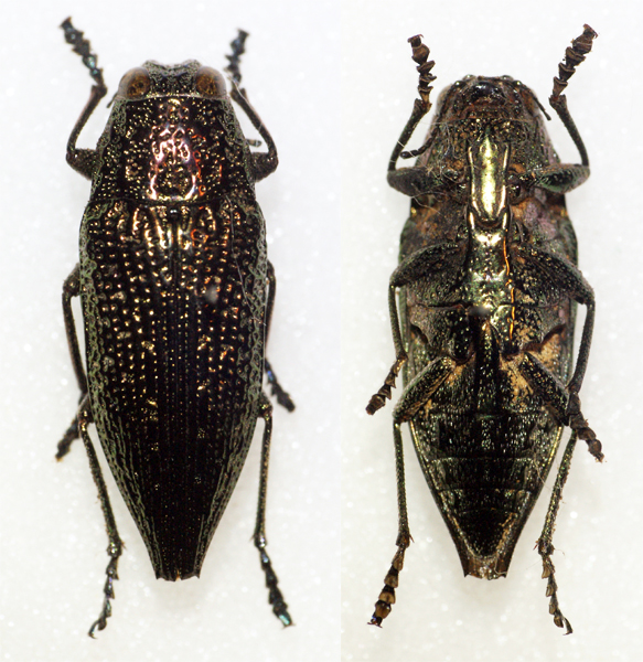 Buprestidae - In collection